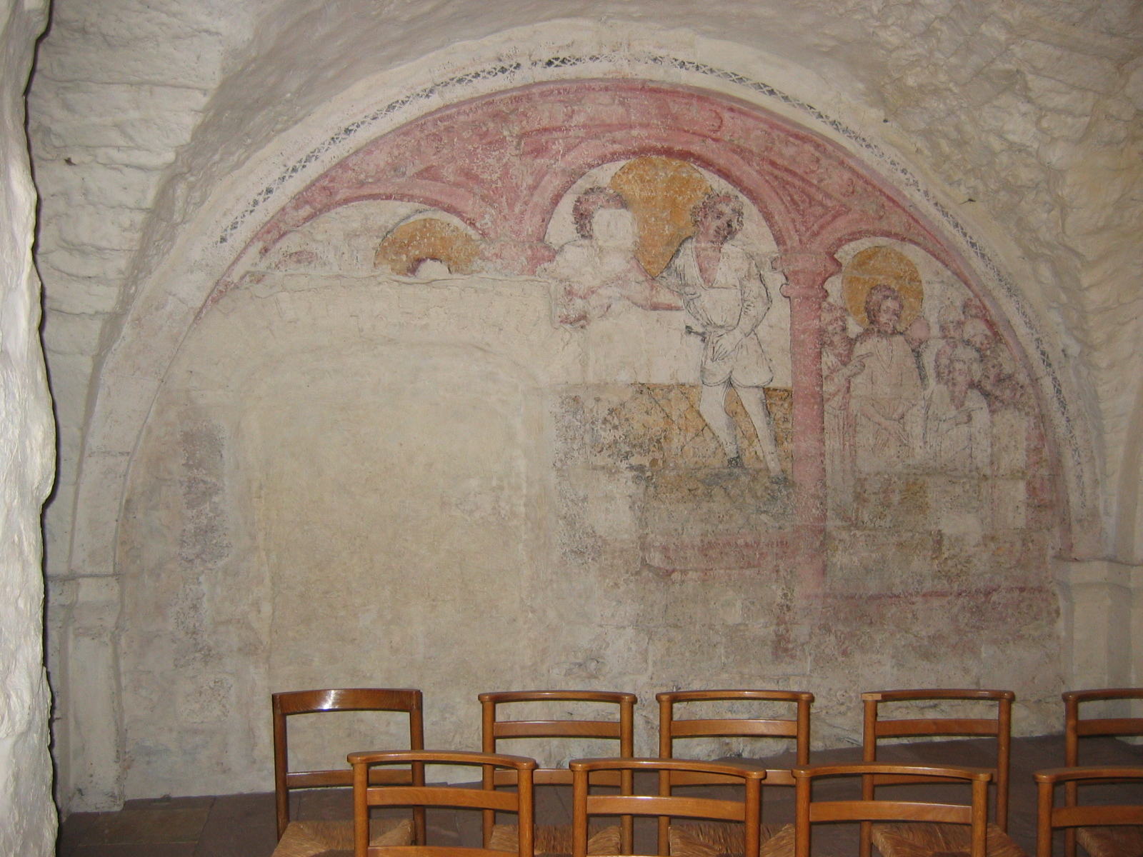 Sankt-Veits-Kapelle im Untergeschoss der Kirche Unser Lieben Frauen, errichtet als Beinkeller wohl im 12. Jh., Fresco 15. Jh.